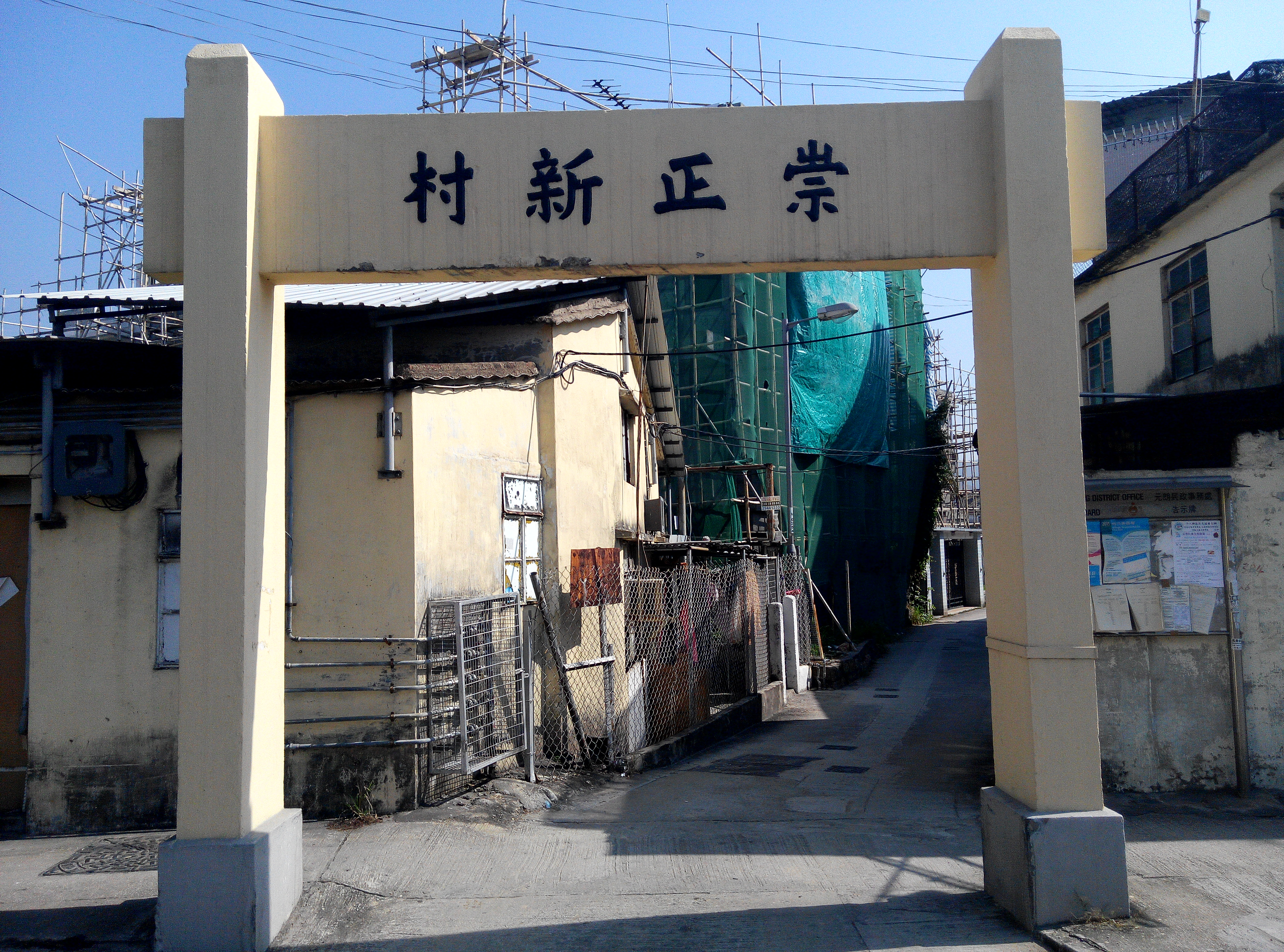 崇正新村牌樓